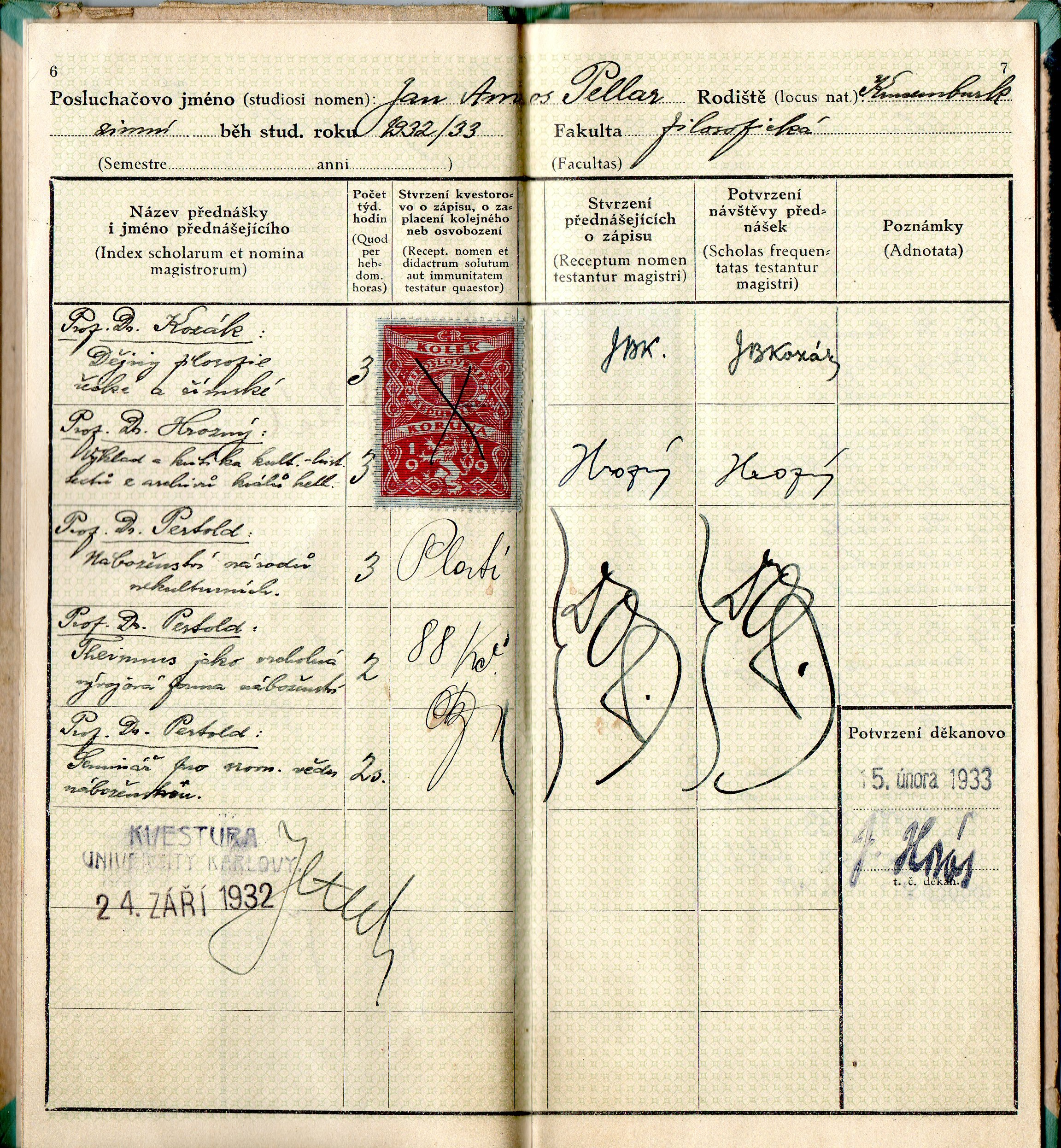 Index filozofické fakulty UK, podpisy prof. Pertolda a prof. Hrozného